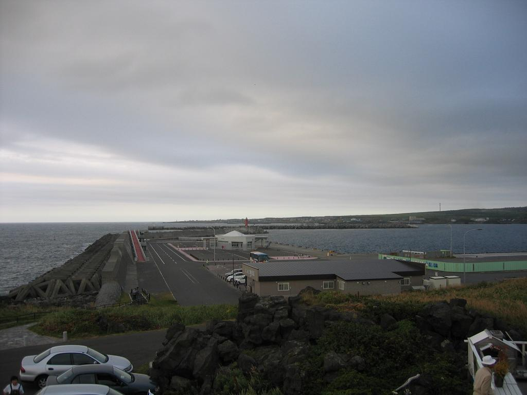 沓形港（北海道利尻郡利尻町） くつかたこう